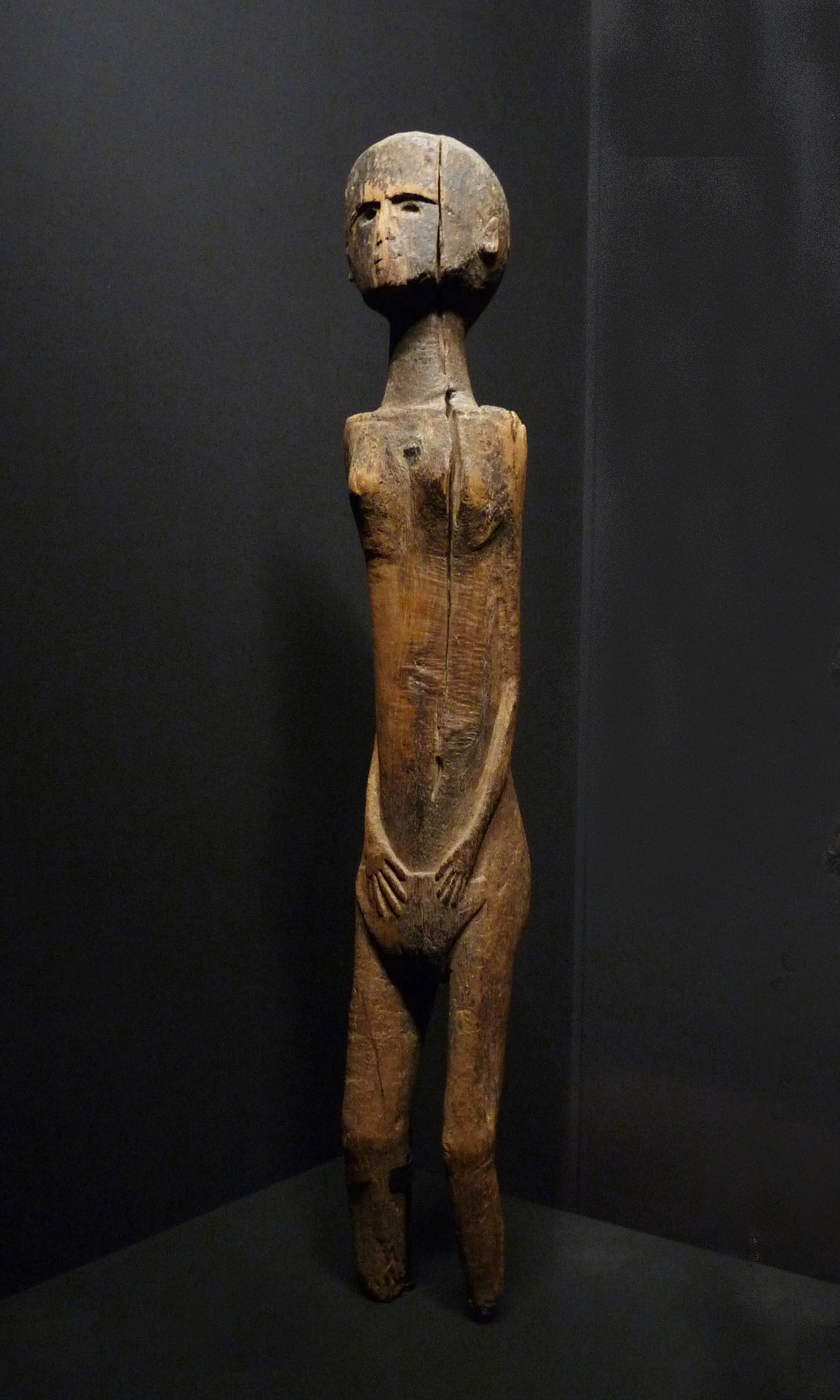 Statue magique sampy, population Bara, Madagascar. Début du 20e siècle. Bois. Musée du quai Branly.